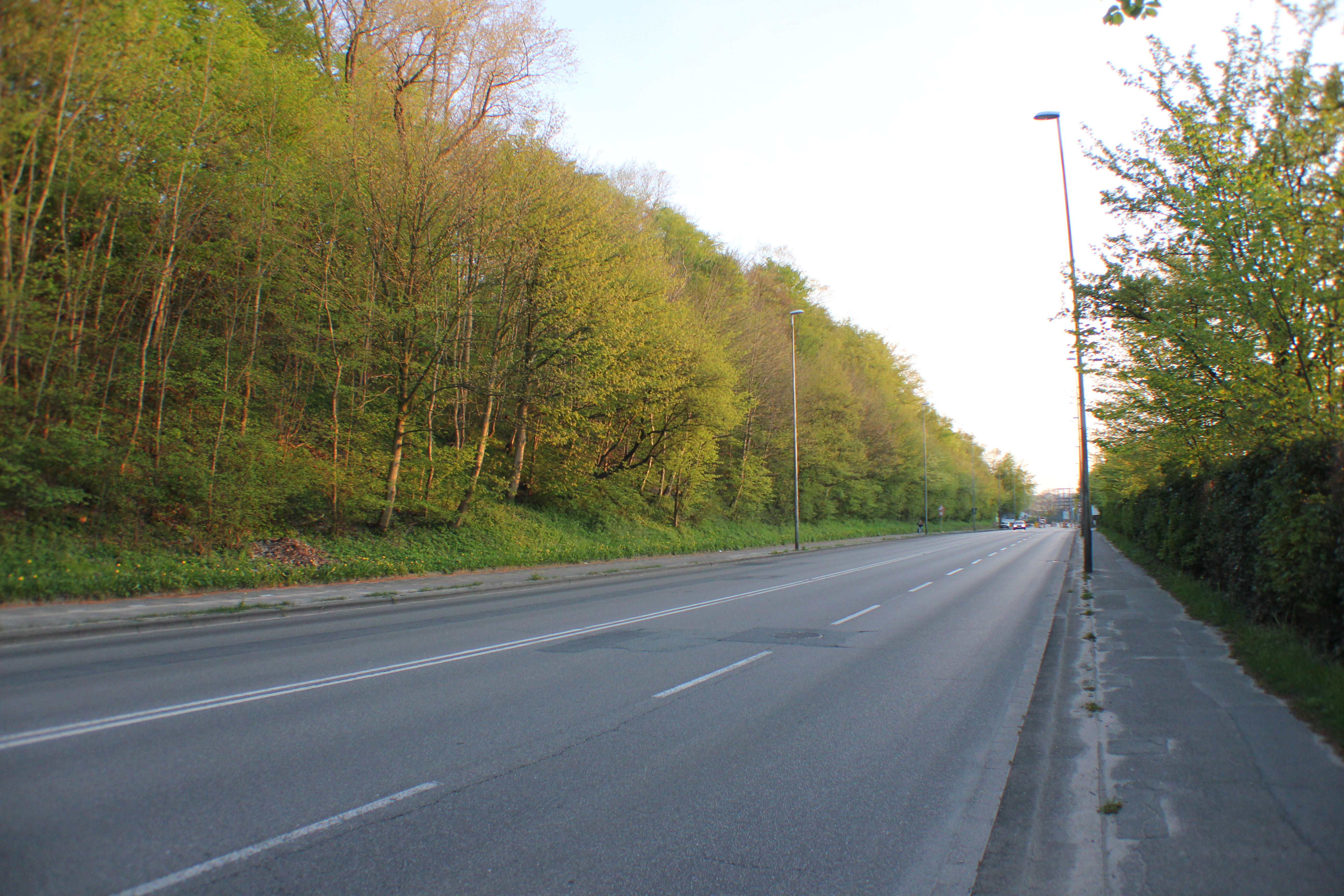 Straße Kielseng während der Teilsperrung im April 2014 (Flensburg), Bild 48